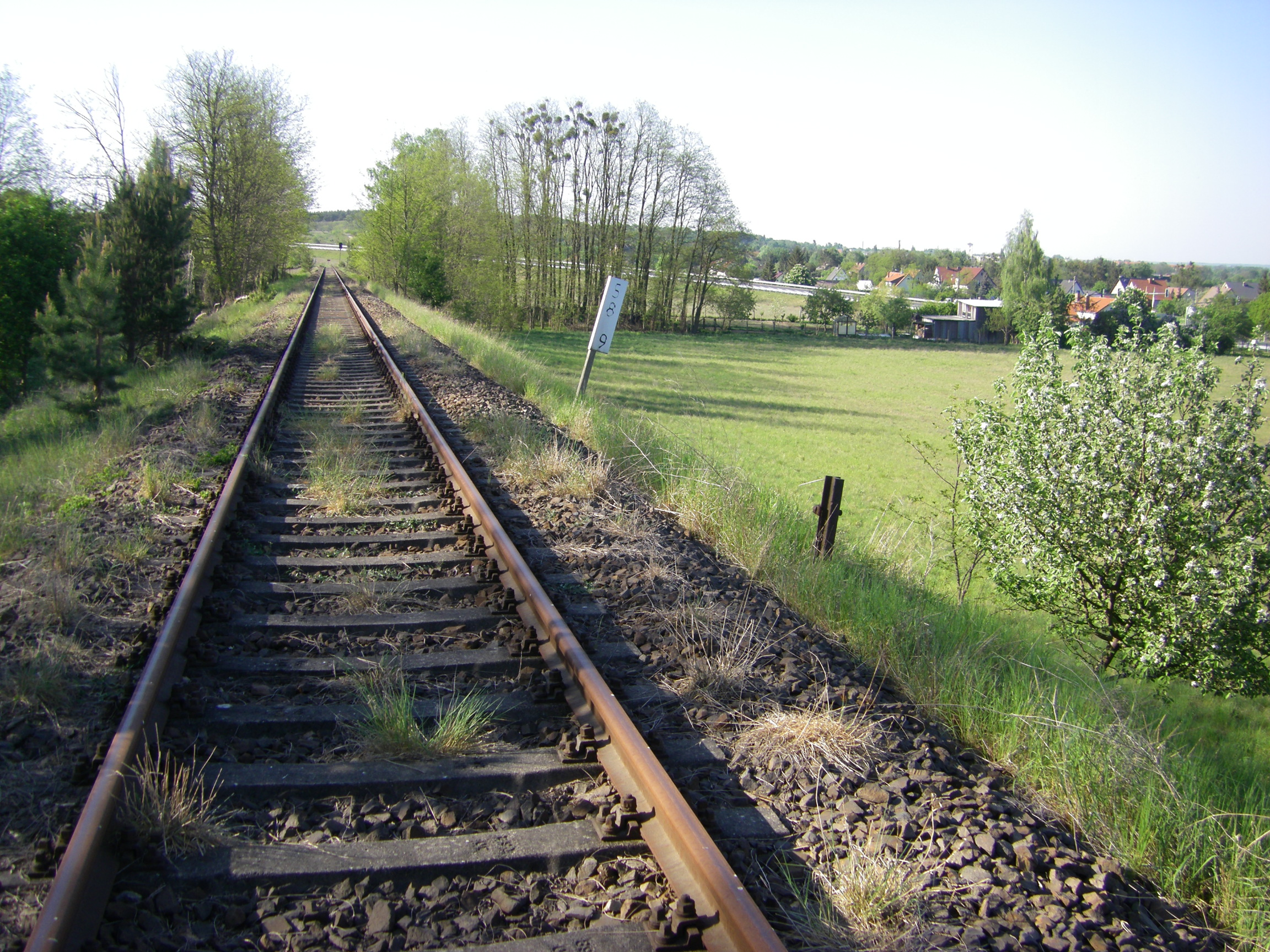 Wriezener Bahn 2009 die Gleise im Vordergrund und die Stadt Wriezen im Hintergrund sind getrennt durch die neu gebaute Orstumfahrunh Wriezen der B167.